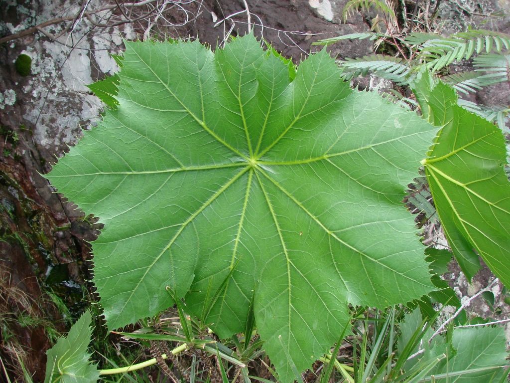 Klotzschia glaziovii Urb. - APIACEAE - Parque Nacional da Chapada dos Veadeiros - Alto Paraíso de Goiás - Goiás - Brasil.